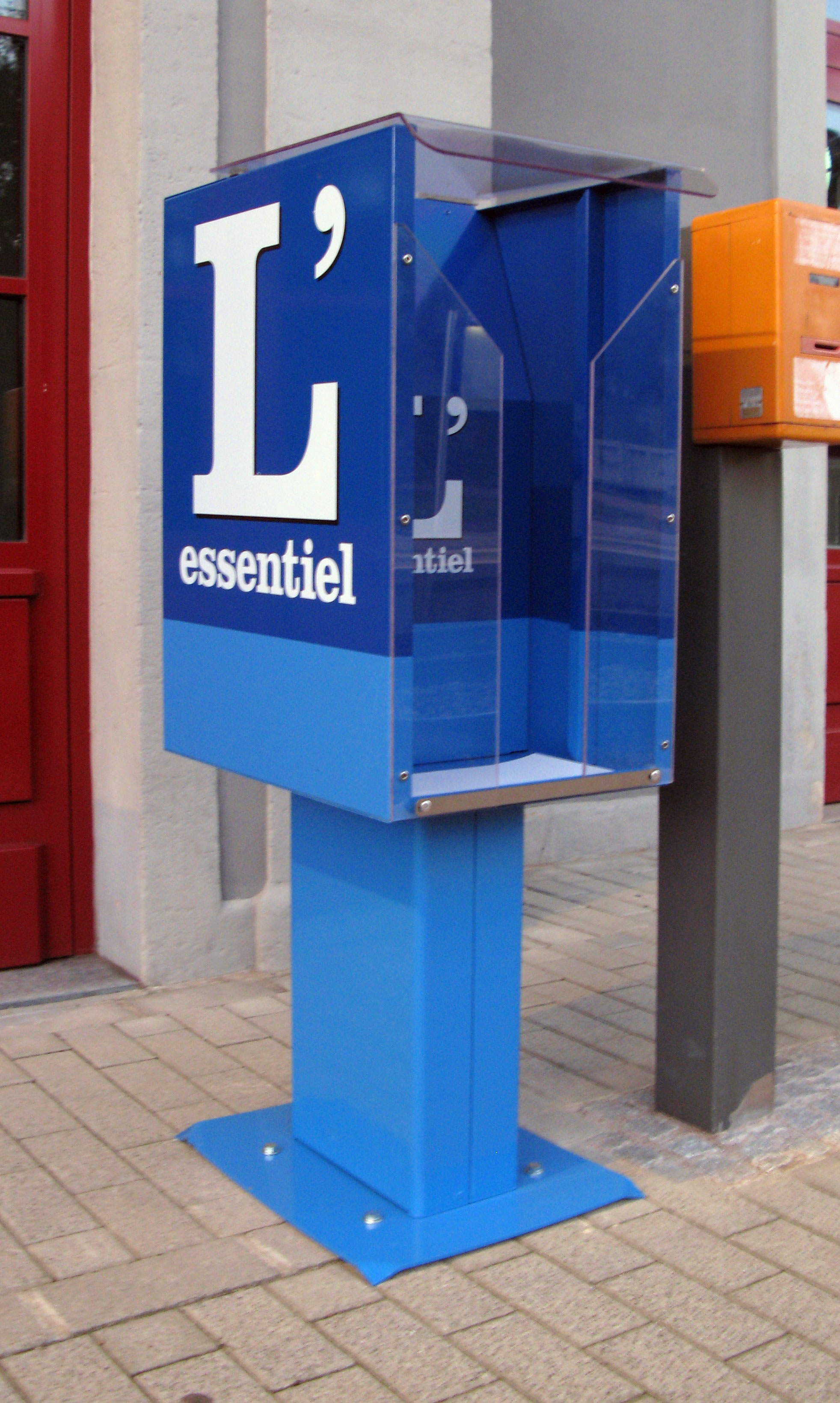 Ess.